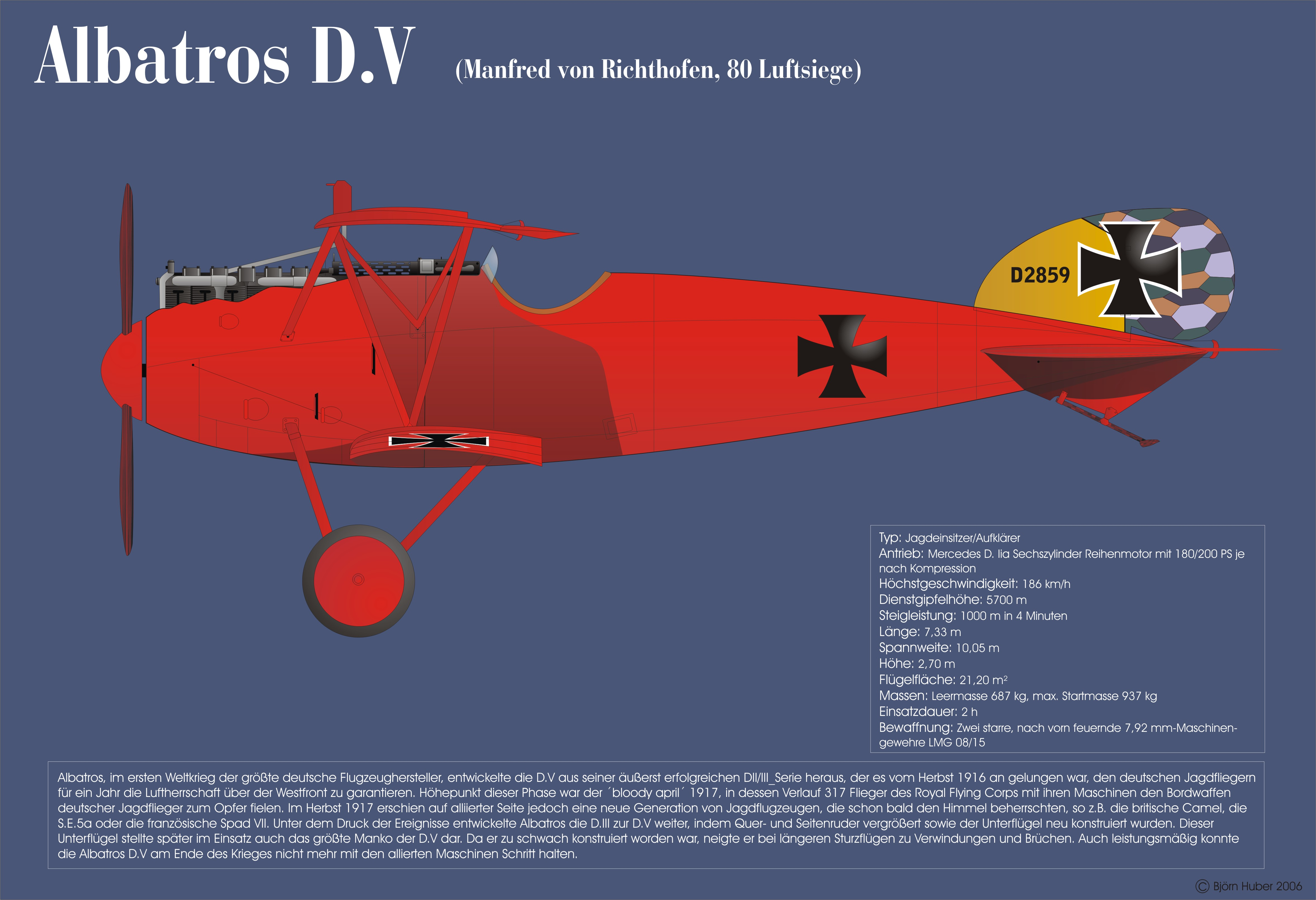 Bildbeschreibung: Albatros D.v, geflogen von Manfred von Richthofen Quelle: Selbsterstellte Grafik Fotograf/Zeichner: Björn Huber Datum: März 2006 Sonstiges: GNU-Lizenziert